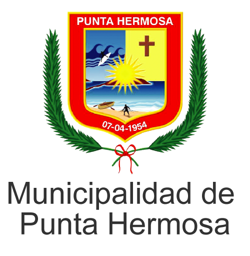 Escudo de uso oficial de la Municipalidad de Punta Hermosa